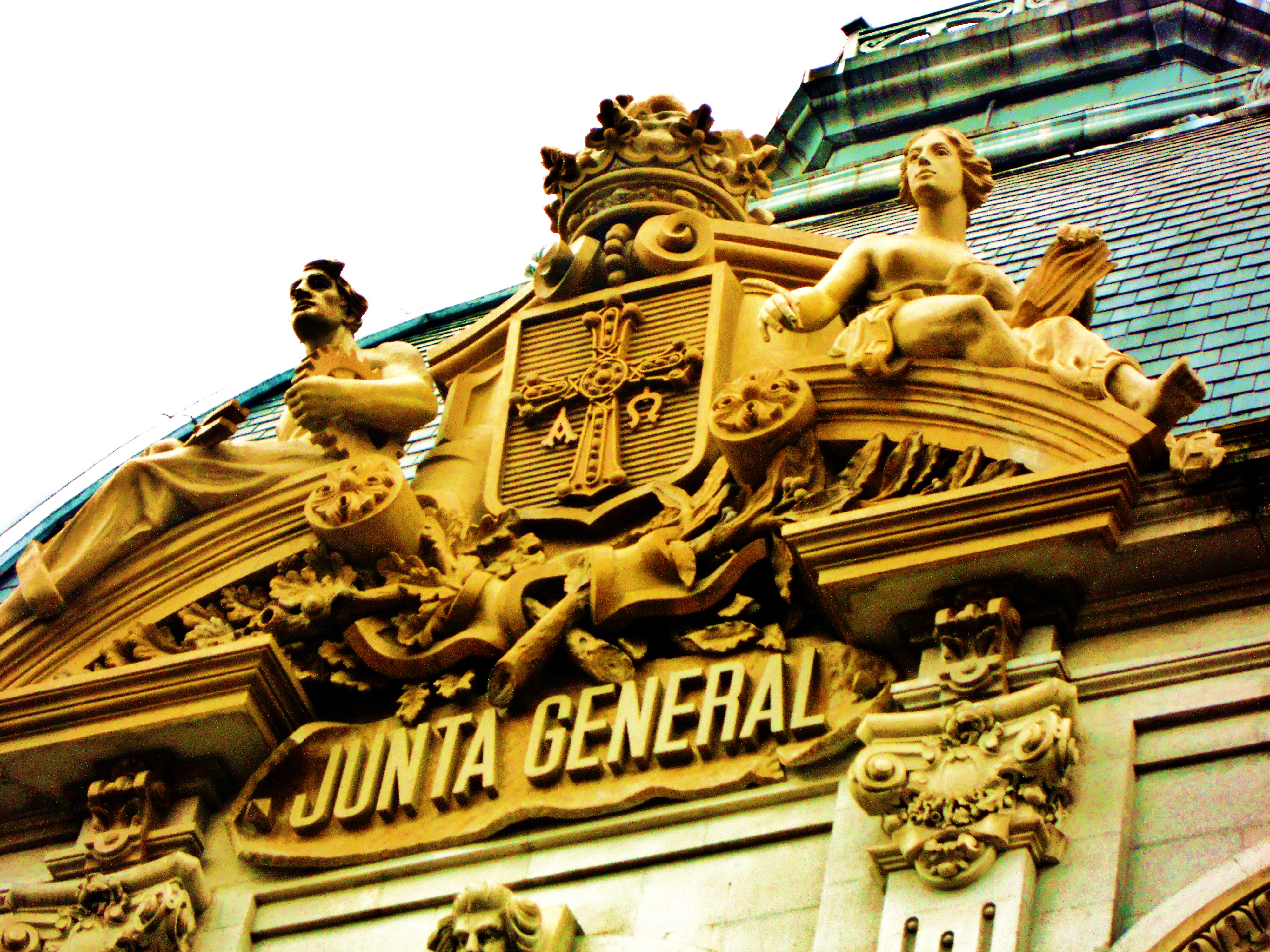 Escudu fachada Xunta Xeneral d'Asturies